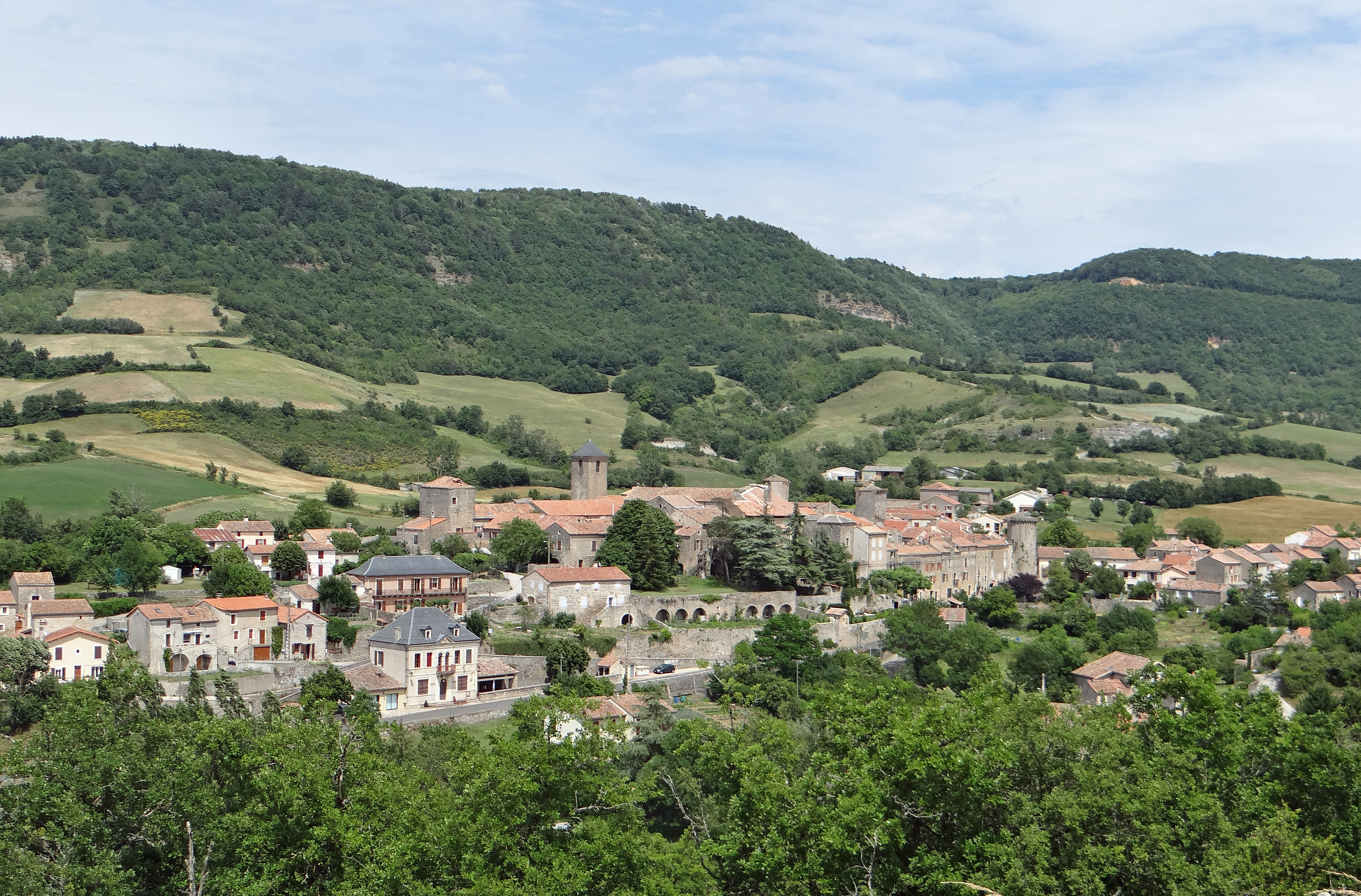 Sainte-Eulalie-de-Cernon - Vue générale depuis le CD561